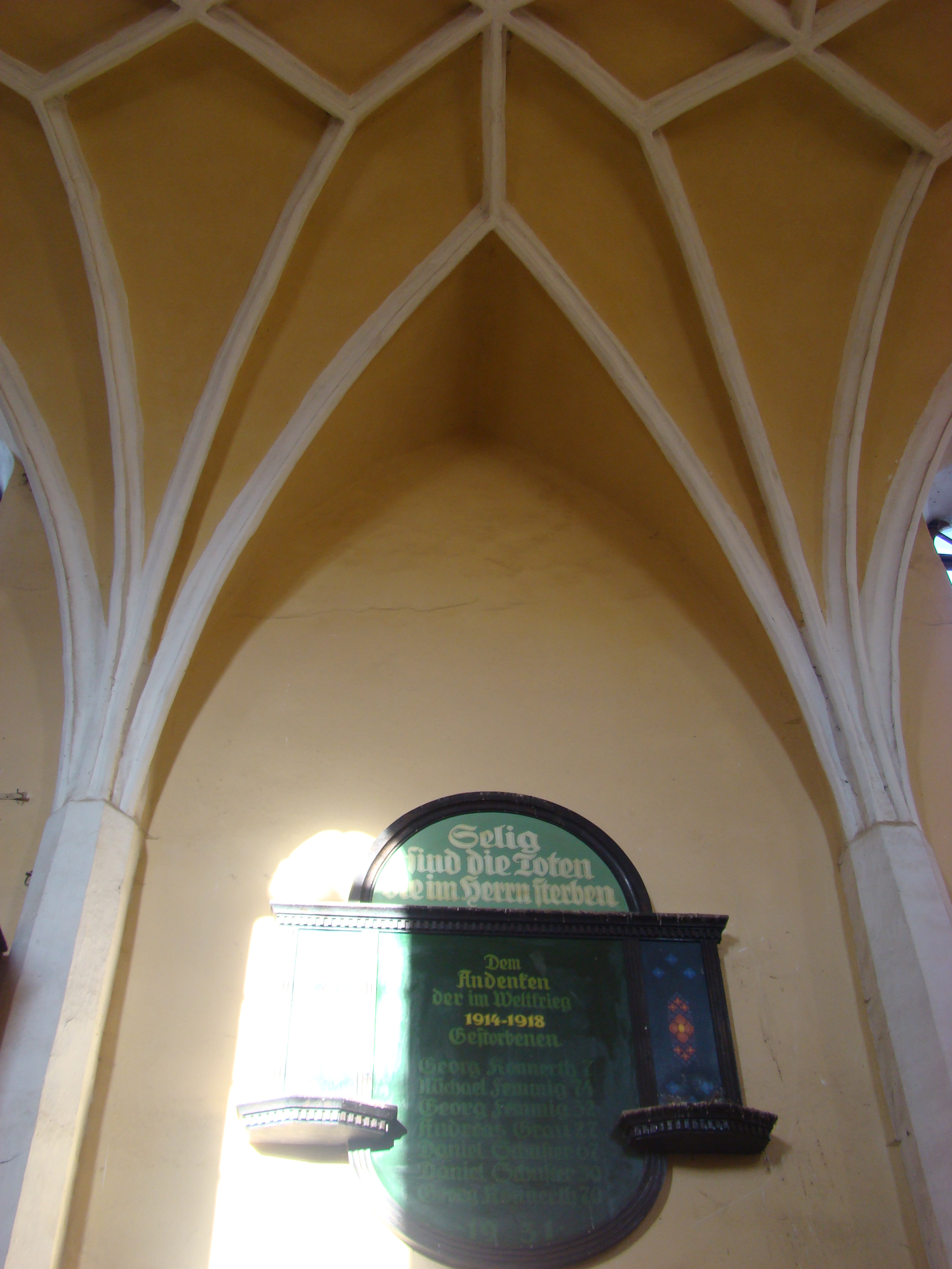 Biserica evanghelică fortificată din Nou, județul Sibiu